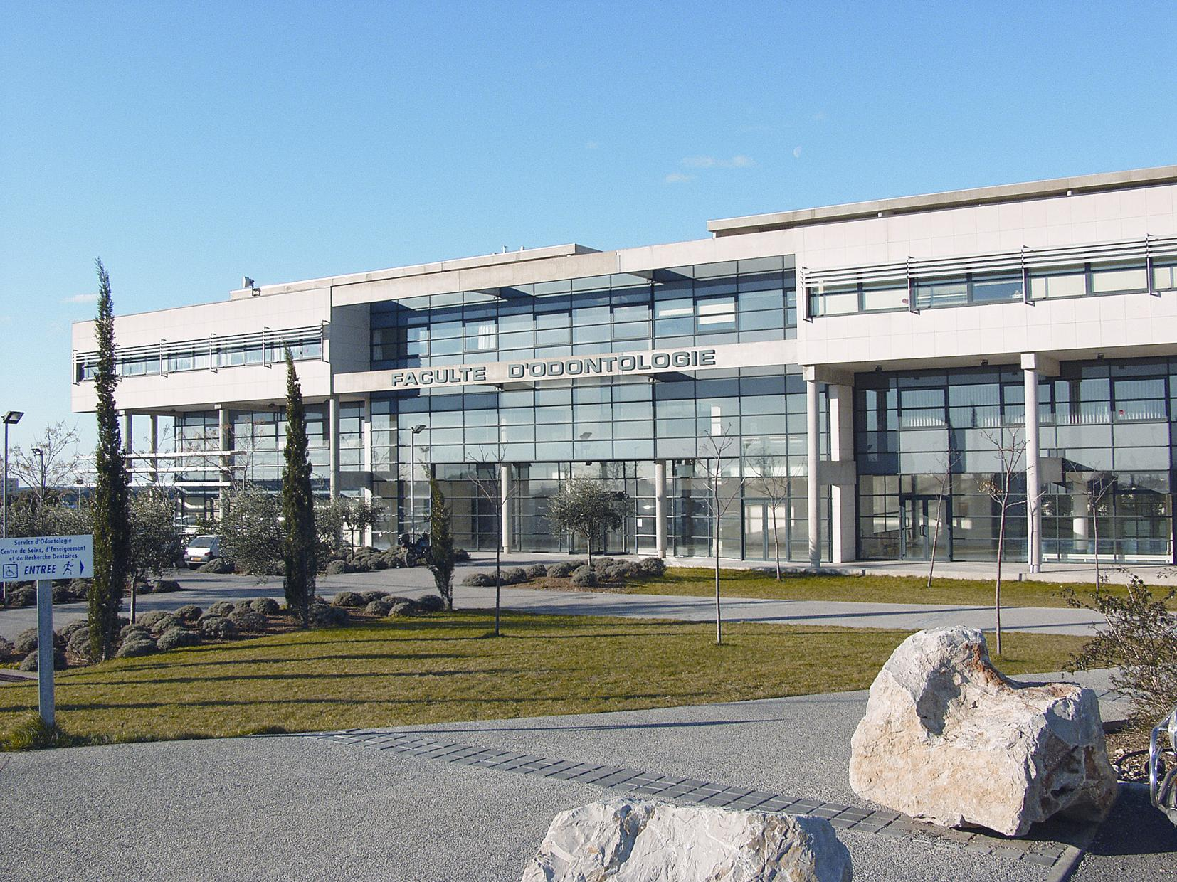 La Faculté d'Odontologie de Montpellier, Université Montpellier 1 (France)